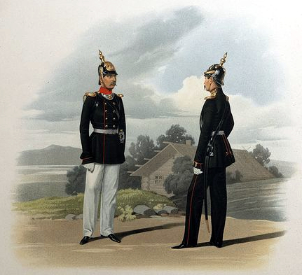 Обер-Офицеры Пехотных и Лейб-Егерского Бородинского Его Величества полков. (В парадной форме.) 15 марта 1855.